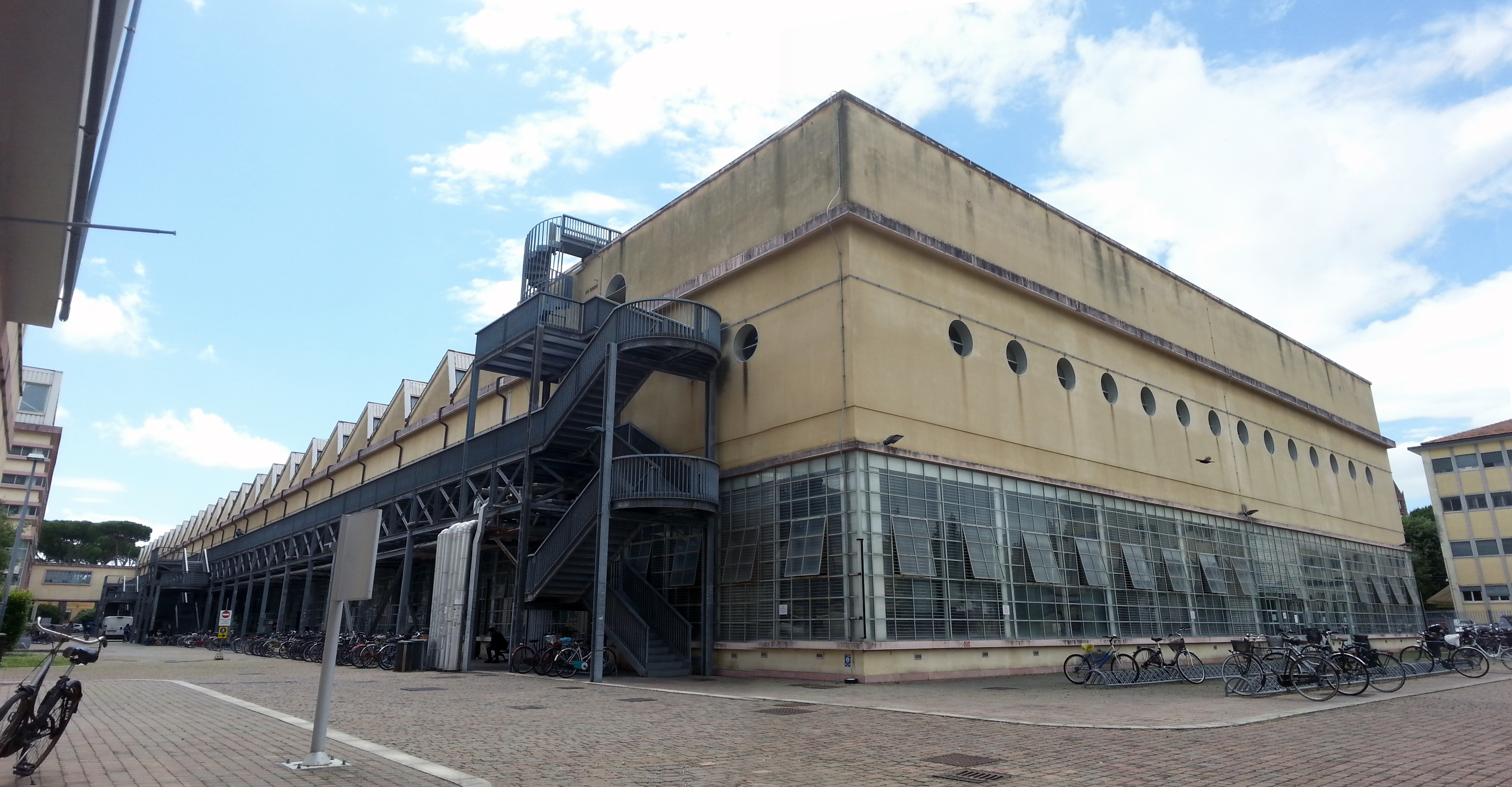 Complesso ex Marzotto (oggi Polo Fibonacci dell'Università di Pisa) - l'edificio B visto dall'aula magna (edificio E)